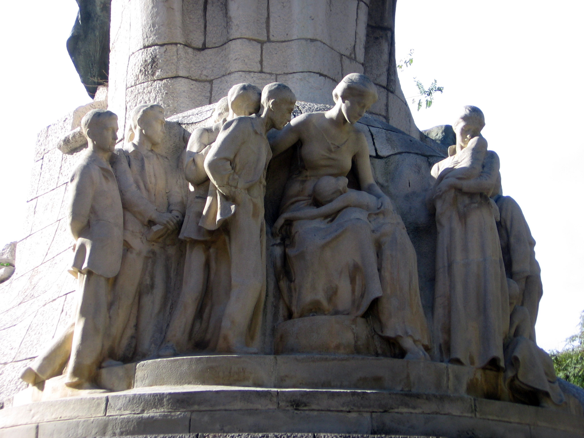 Monumento al Doctor Robert.